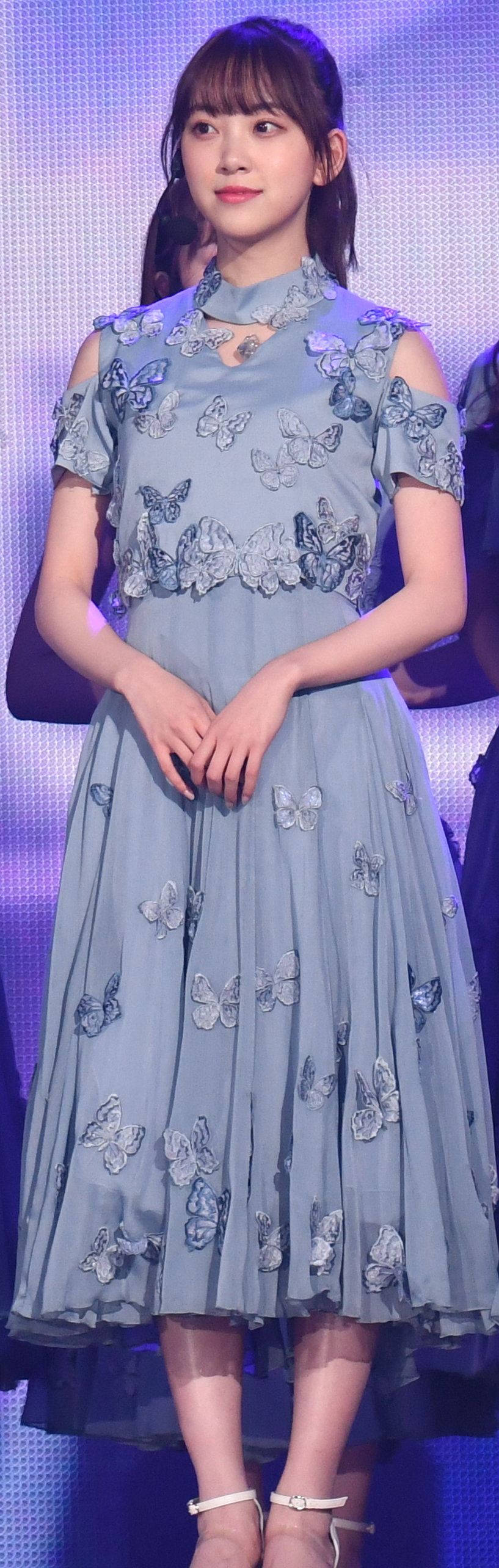 2019.01.26「第14回 KKBOX MUSIC AWARDS in Taiwan」乃木坂46 @台北小巨蛋